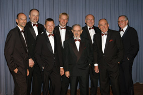 das Siggi Gerhard Swingtett & Brass